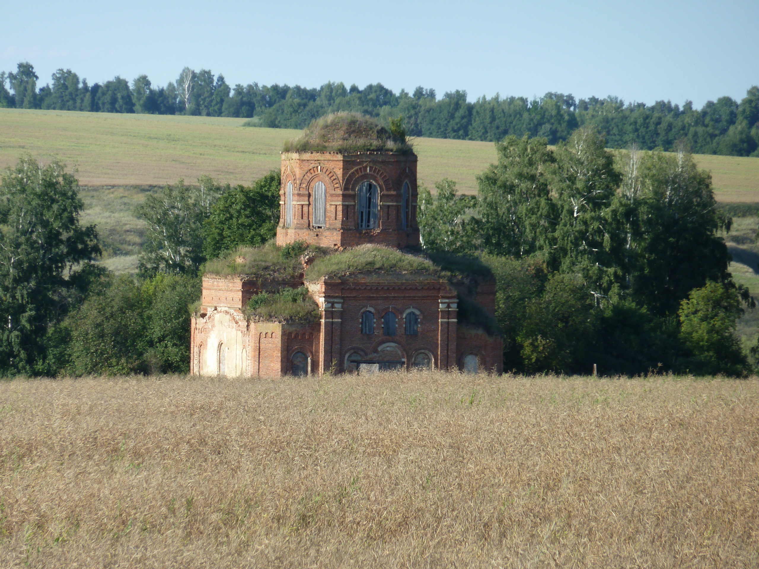 Успенская церковь